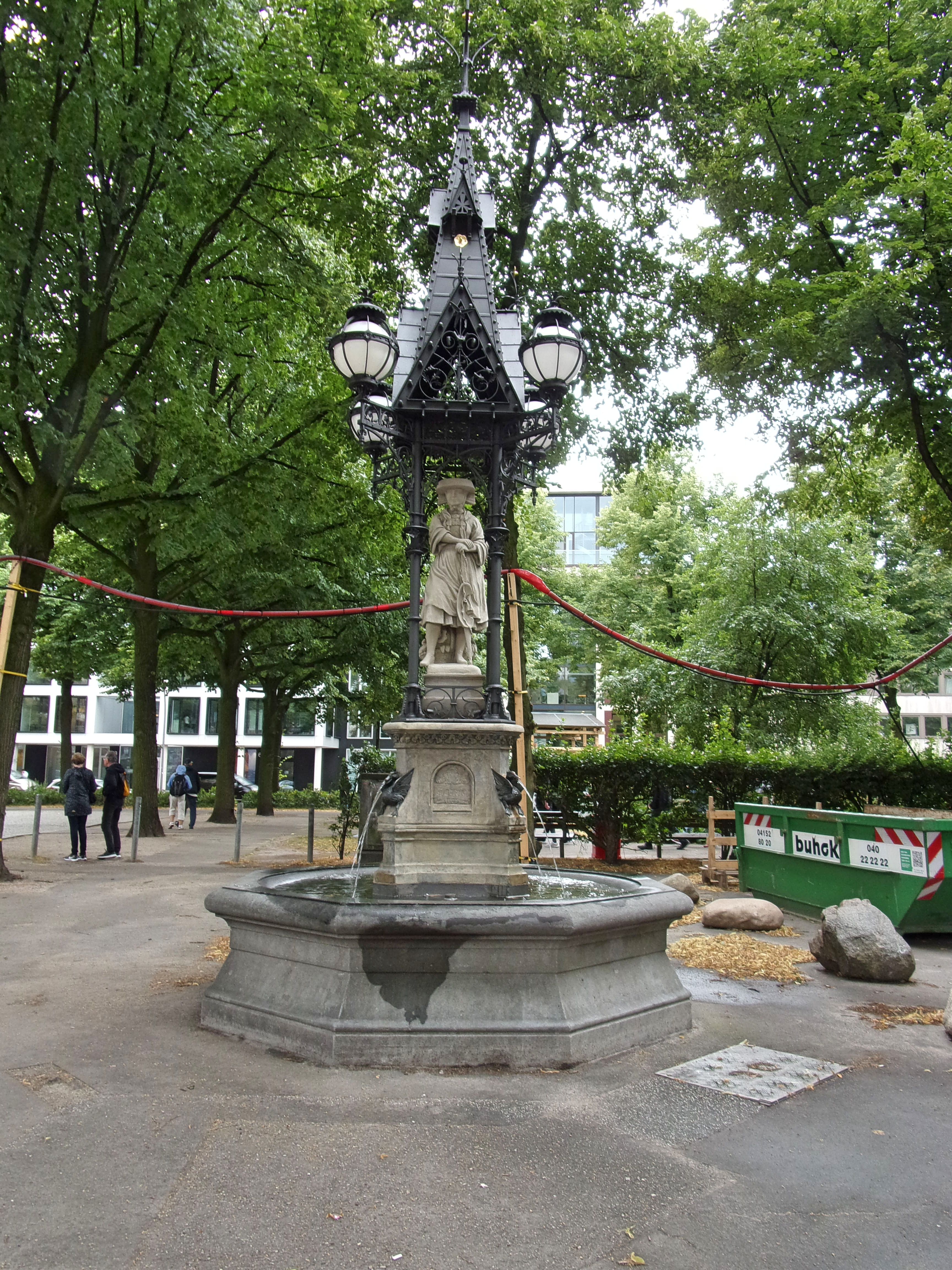 Der Vierländerin-Brunnen von Engelbert Pfeiffer auf dem Hopfenmarkt in Hamburg-Altstadt vor der Ruine der Nikolai-Kirche wurde restauriert und gereinigt. Der Brunnen besteht aus einem Sockel, darüber die Skulptur einer Vierländerin in typischer Tracht unter einem neogotischem Dach mit vier Lüstern. Als Wasserspeier dienen vier Enten. Die Inschrift im Brunnen lautet: Am Markt lernt man die Leute kennen. Der Brunnen wurde 1878 als Marktbrunnen auf dem Meßberg errichtet, der Entwurf des Brunnen stammt von F. A. Meyer, die Skulptur stammt von dem Bildhauer Engelbert Pfeiffer. Mehr Infos zum Brunnen von der Stiftung Denkmalpflege: This is a photograph of an architectural monument.